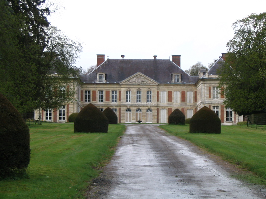 Château de Courcelles-sous-Moyencourt